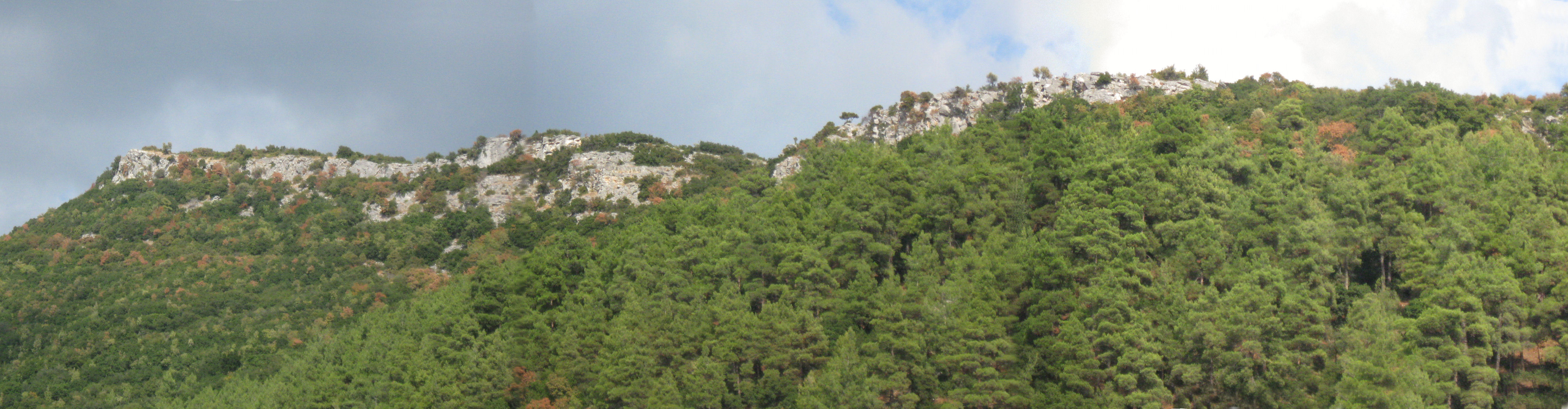 Bergfestung Tsali, aus West (Untere Anlage links)